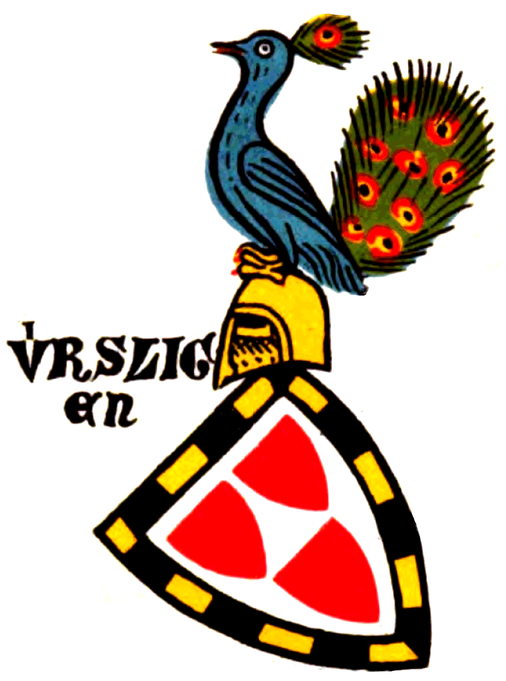 Wappen der Urslingen (hier Uersligen)